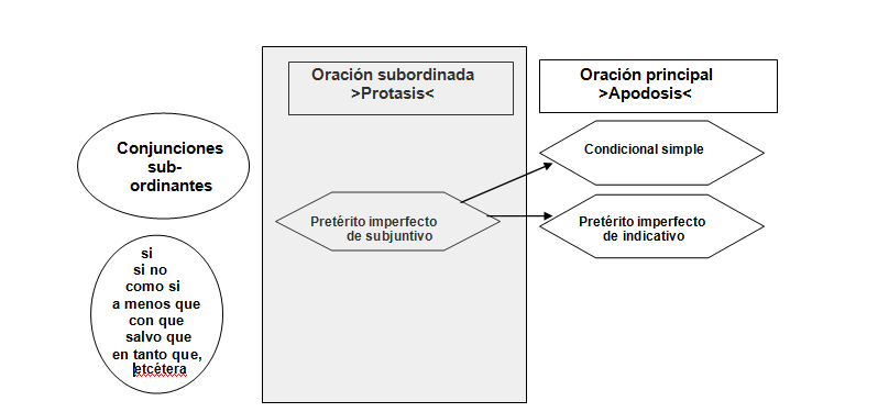 Oraciones condicionales potenciales (presente)